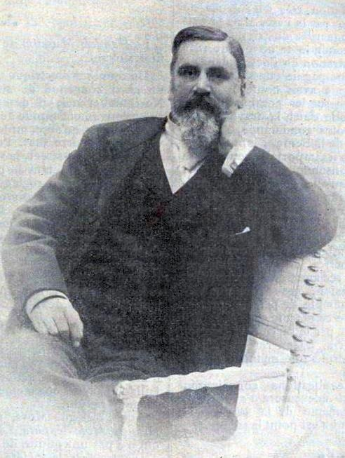 Émile Levassor peu avant sa mort